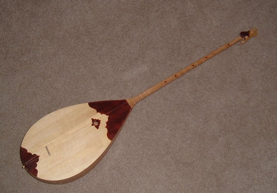 Dombra